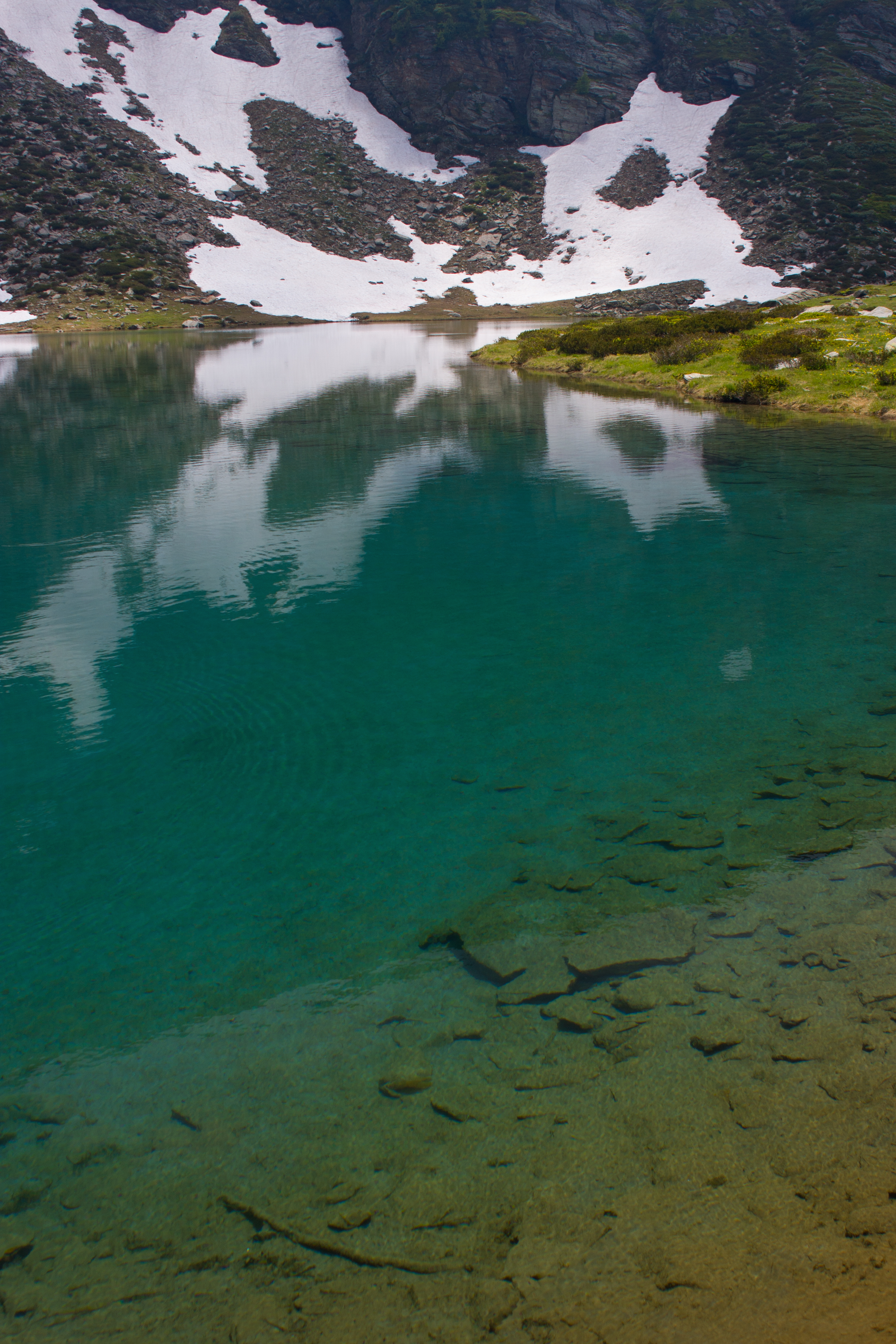 Lago d'Envie, 13 laghi, Val Germanasca, Piemonte